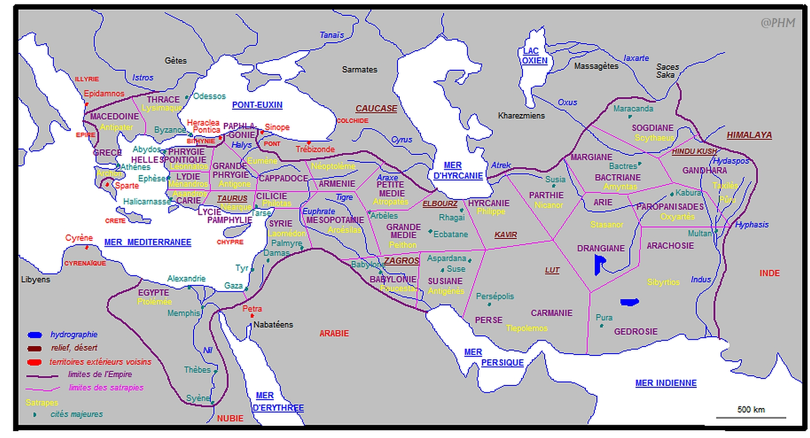 Division de l'empire d'Alexandre le Grand à sa mort en -323